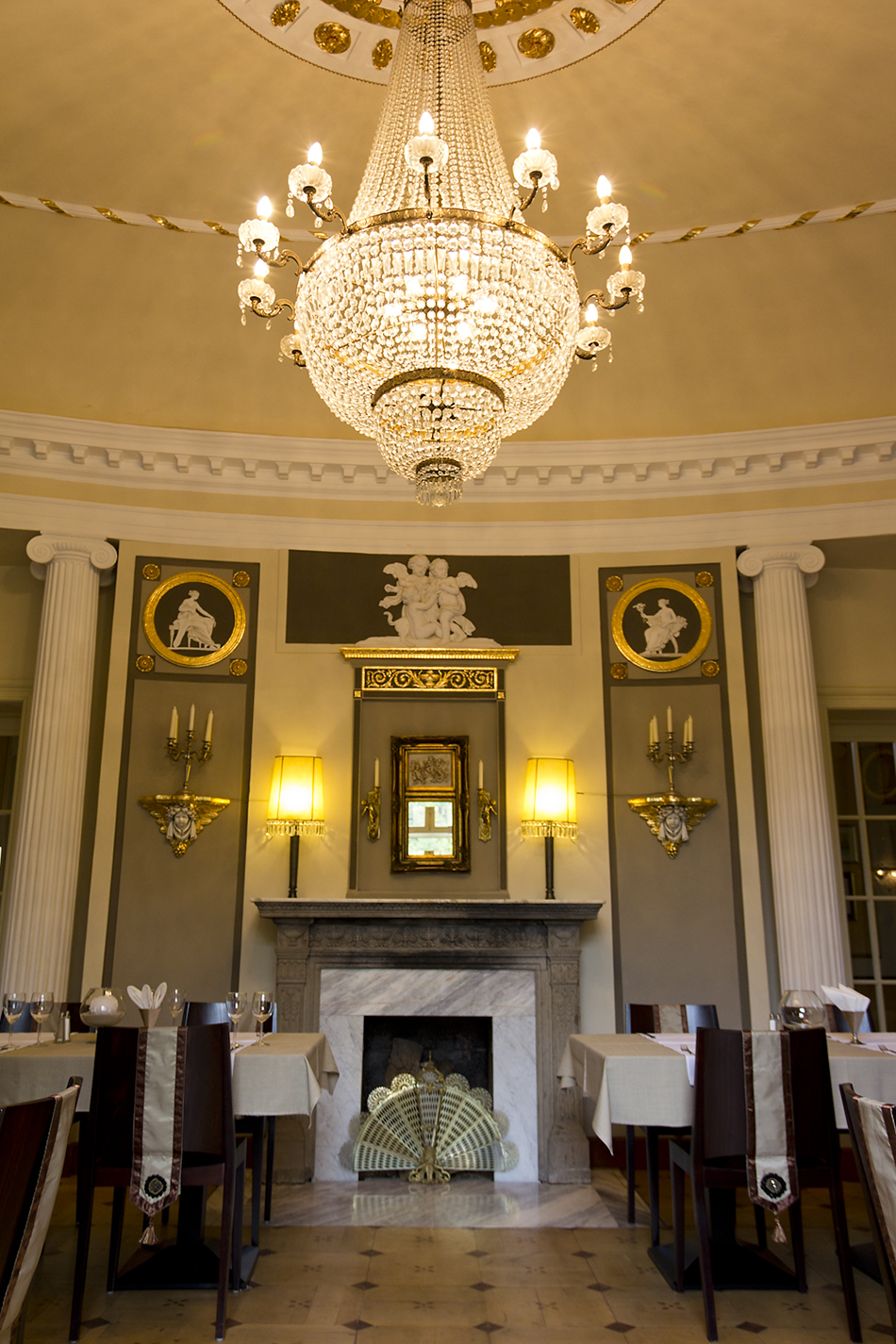 Pałac w Samotworze.